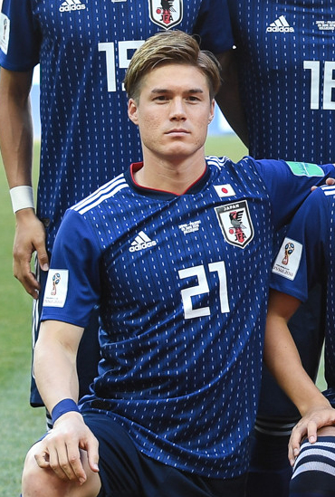 Япония проиграла Польше, но вышла в плей-офф